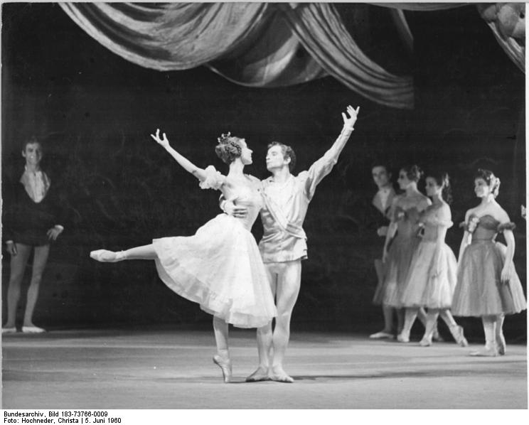 Zentralbild 6.6.1960 Hochneder II. Arbeiterfestspiele des FDGB im Bezirk Karl-Marx-Stadt. An dem am 4.6.1960 eröffneten großen Kulturfestival der Werktätigen nehmen neben Künstler und Volkskunstgruppen aus der DDR auch Kulturschaffende aus den befreundeten sozialistischen Ländern teil. Aus der CSR kam das Ensemble des J.K. Tyl-Theaters Plzen und trug durch eine hervorragende Aufführung des Balletts "Aschenbrödel" von Prokofjew am 5.6.1960 im Opernhaus von Karl-Marx-Stadt zum Gelingen der II. Arbeiterfestspiele bei. UBz: Szene aus dem Ballett. Als Aschenbrödel Marta Synackova. Der Prinz wird von Jiri Zalud getanzt.